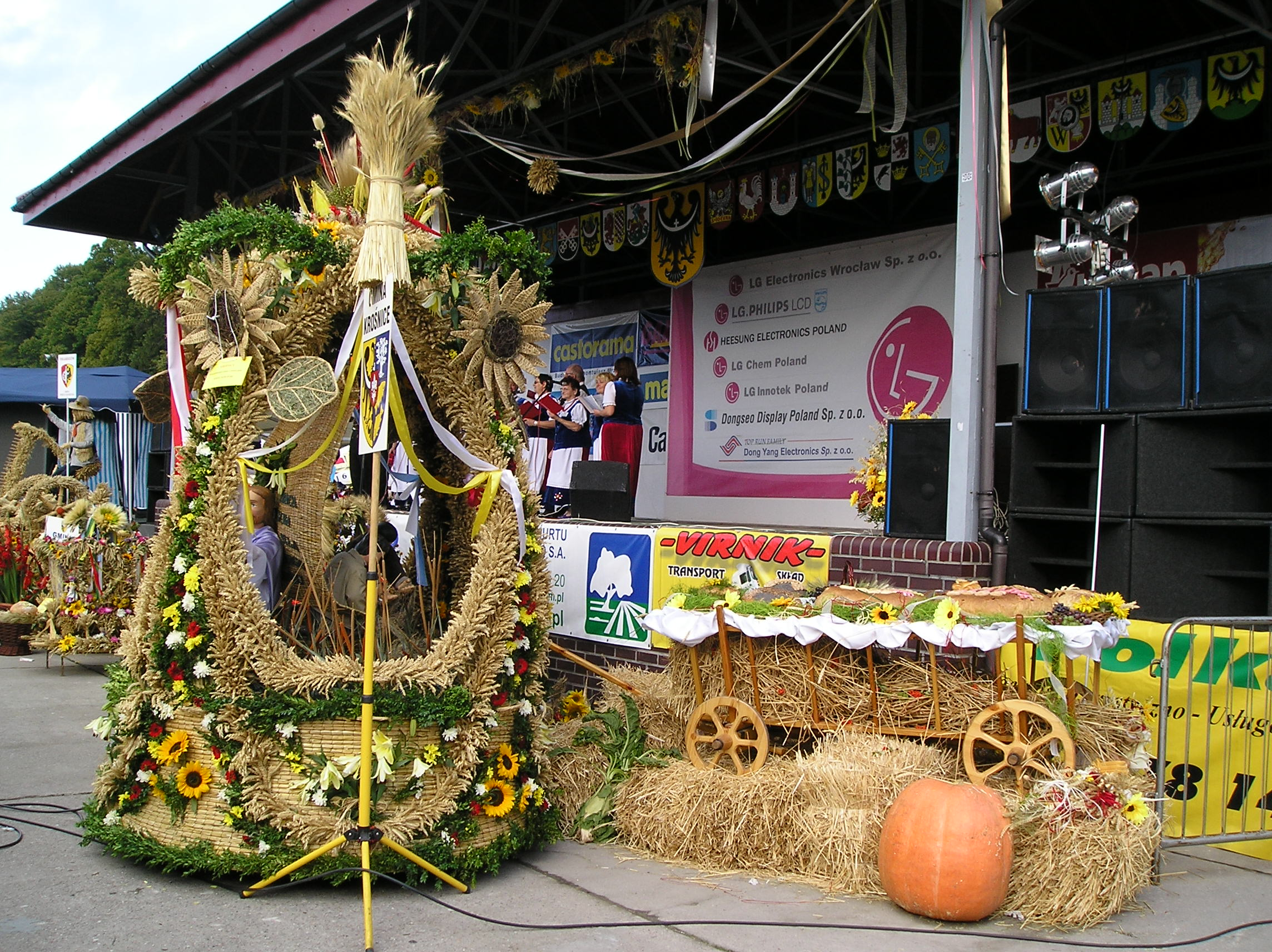 Dożynki w Kobierzycach pod Wrocławiem - 2006